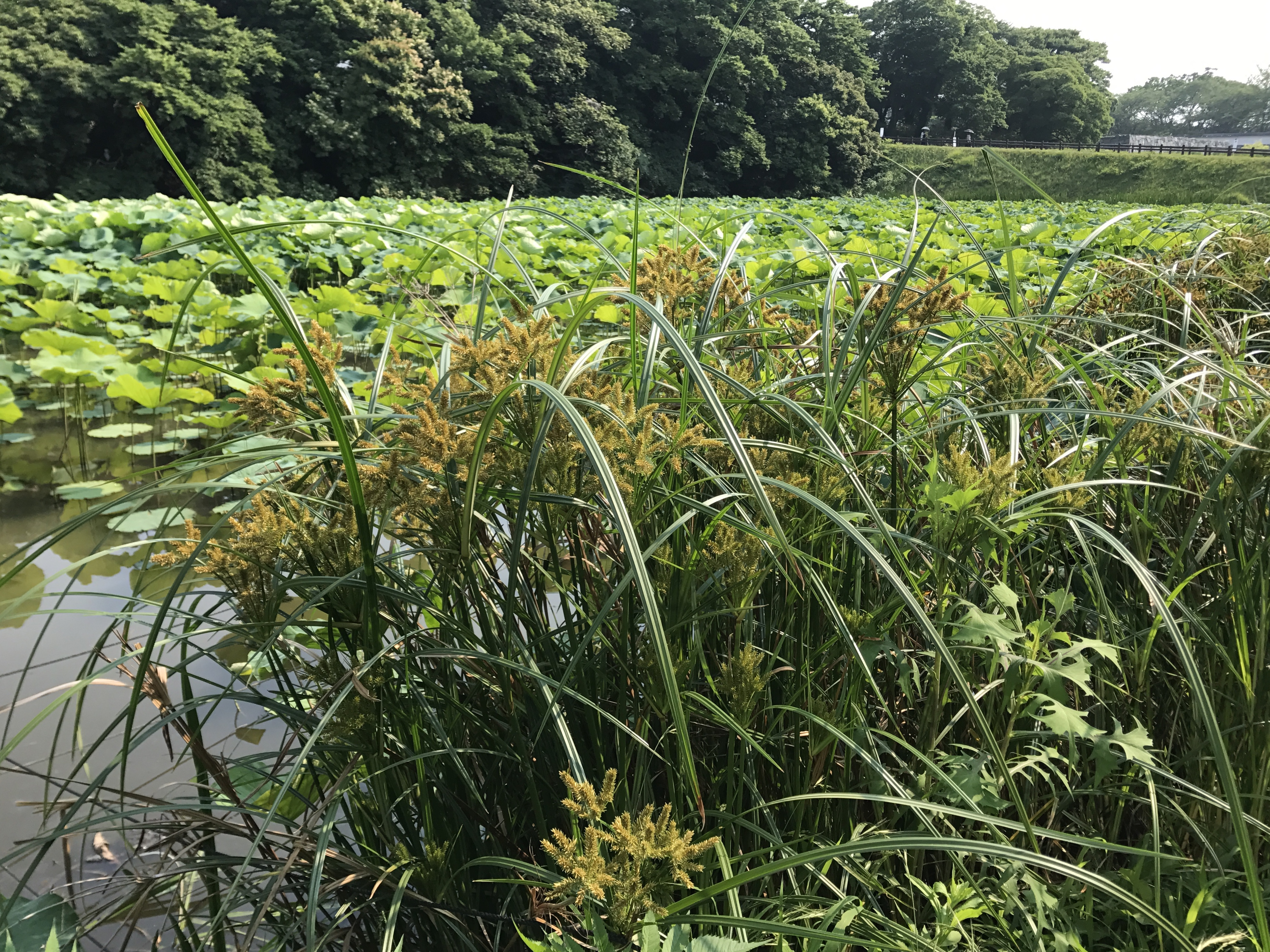 福岡城上之橋付近のツクシオオガヤツリとハス